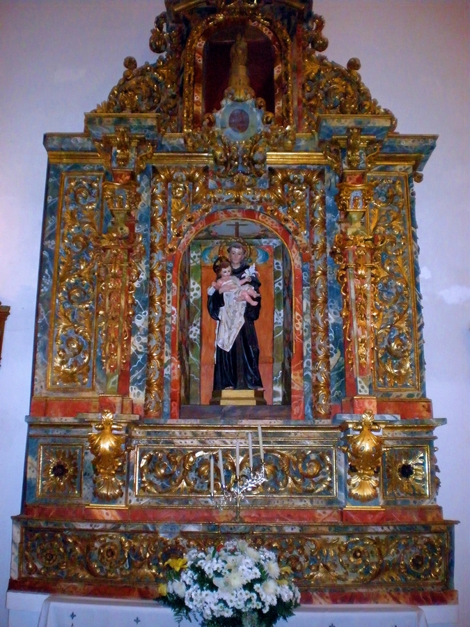 En la Iglesia Parroquial de San Juan Bautista de Pozuelo de Calatrava. Restauración financiada a cargo de un matrimonio pozueleño afincado en Madrid.